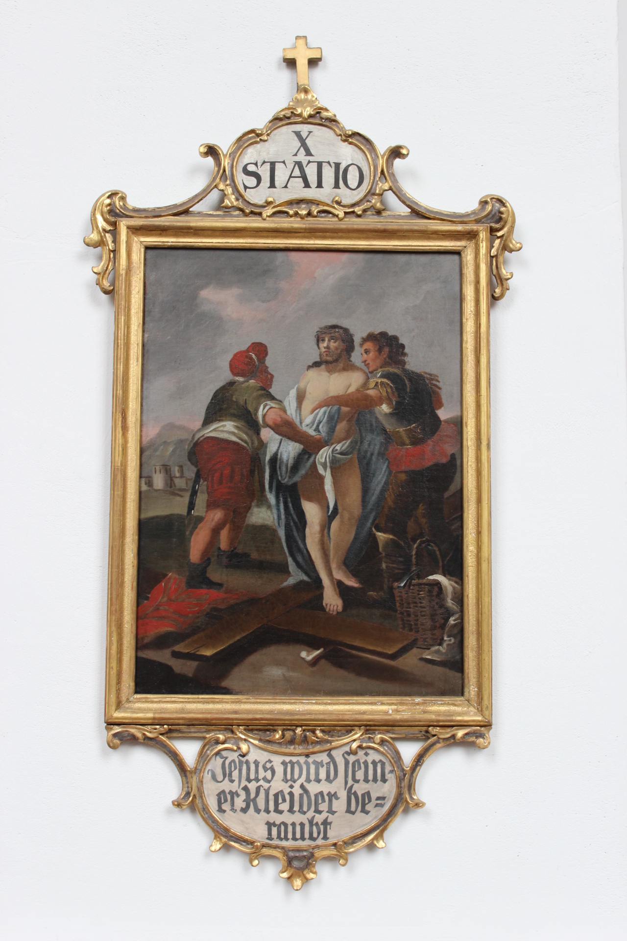 10. Station des Kreuzwegs der Heidelberger Jesuitenkirche